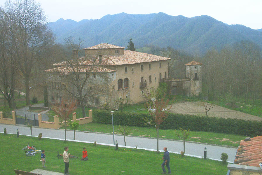 Casal d'El Cavaller, a Vidrà